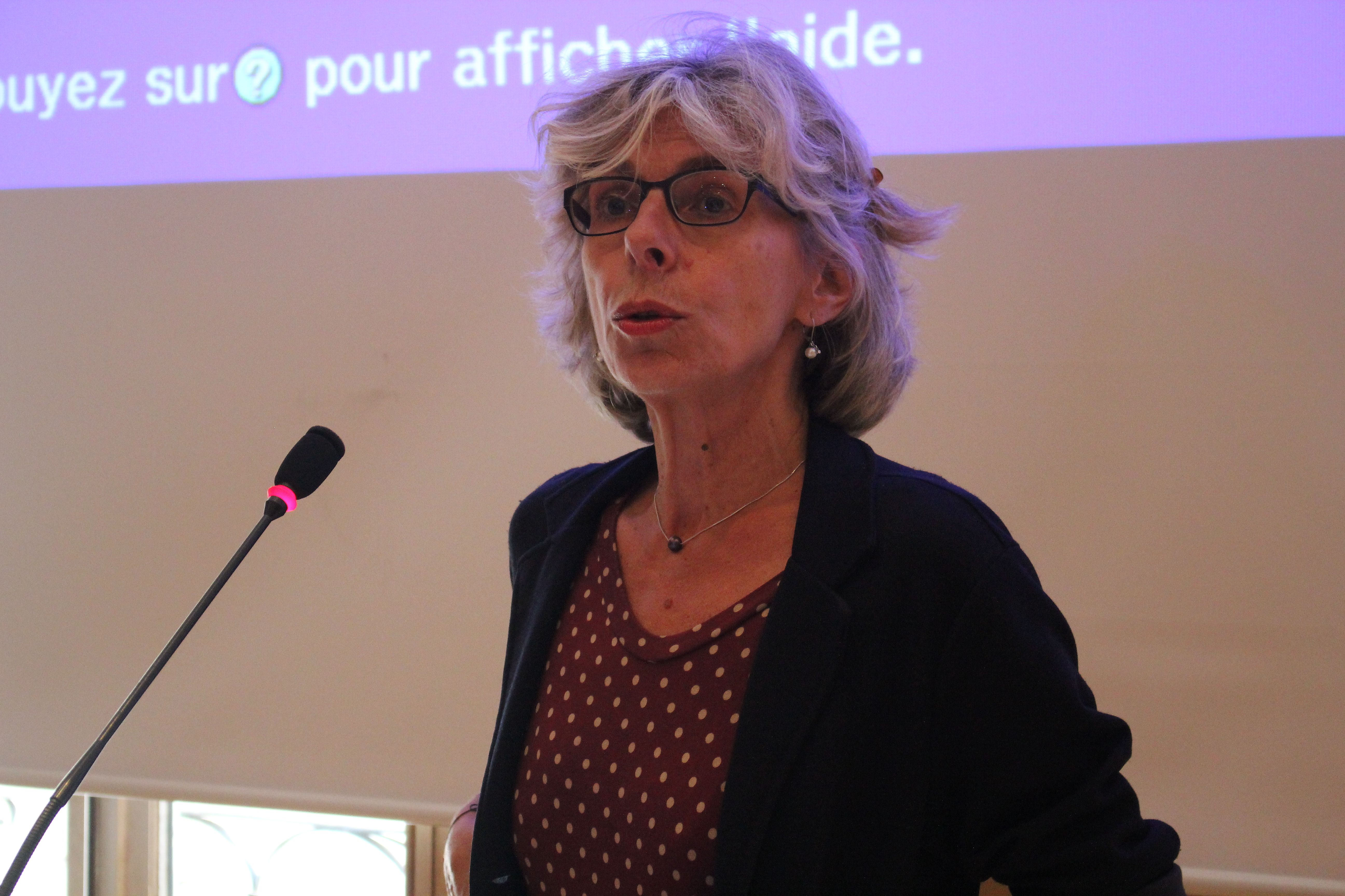 Paule du Bouchet (SNE) - Grand Prix du livre audio 2015